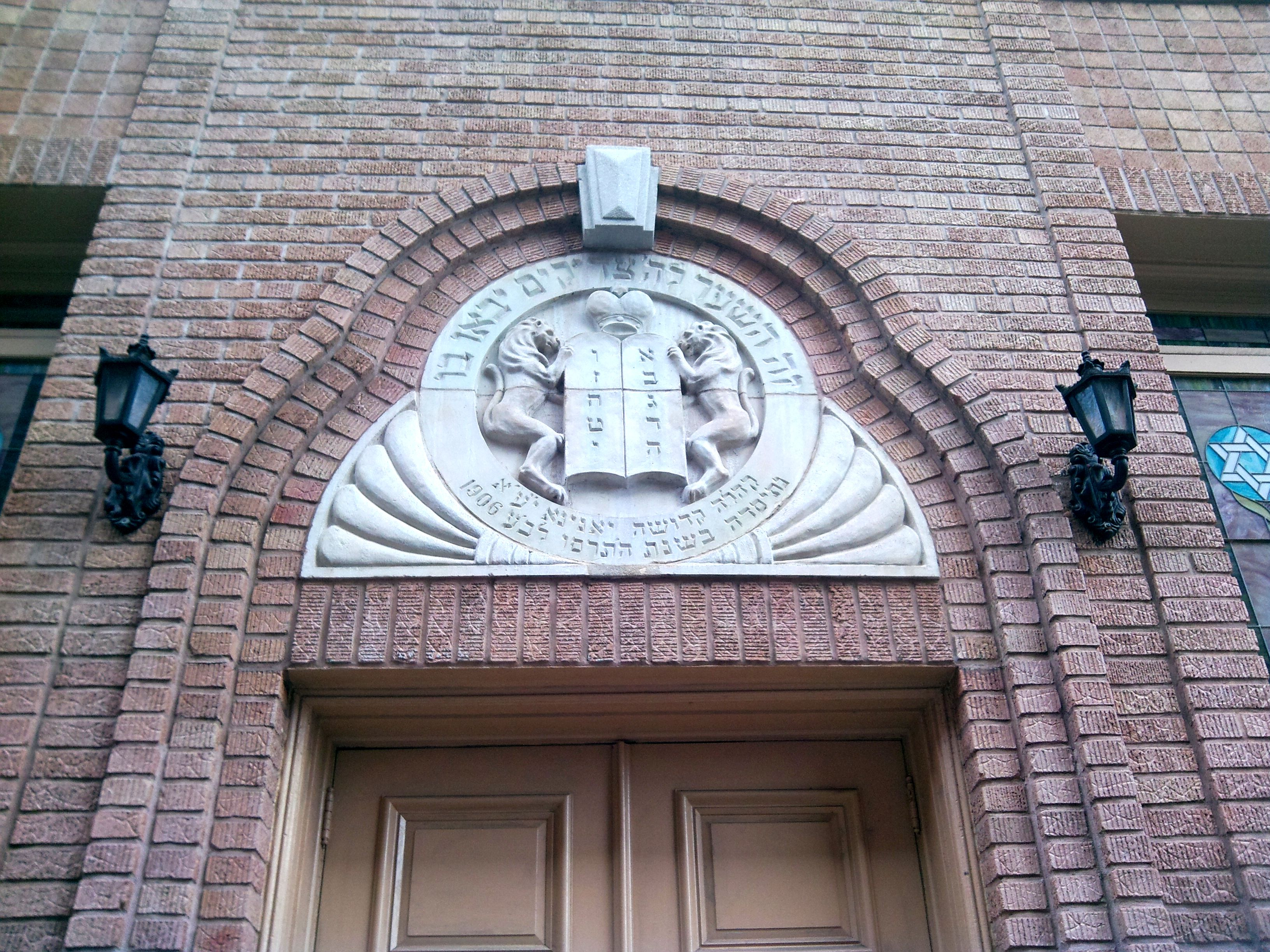 It is the only Romaniote Synagogue in the Western Hemisphere according to the plaque. It has been designated a landmark and the plaque is dated 2007